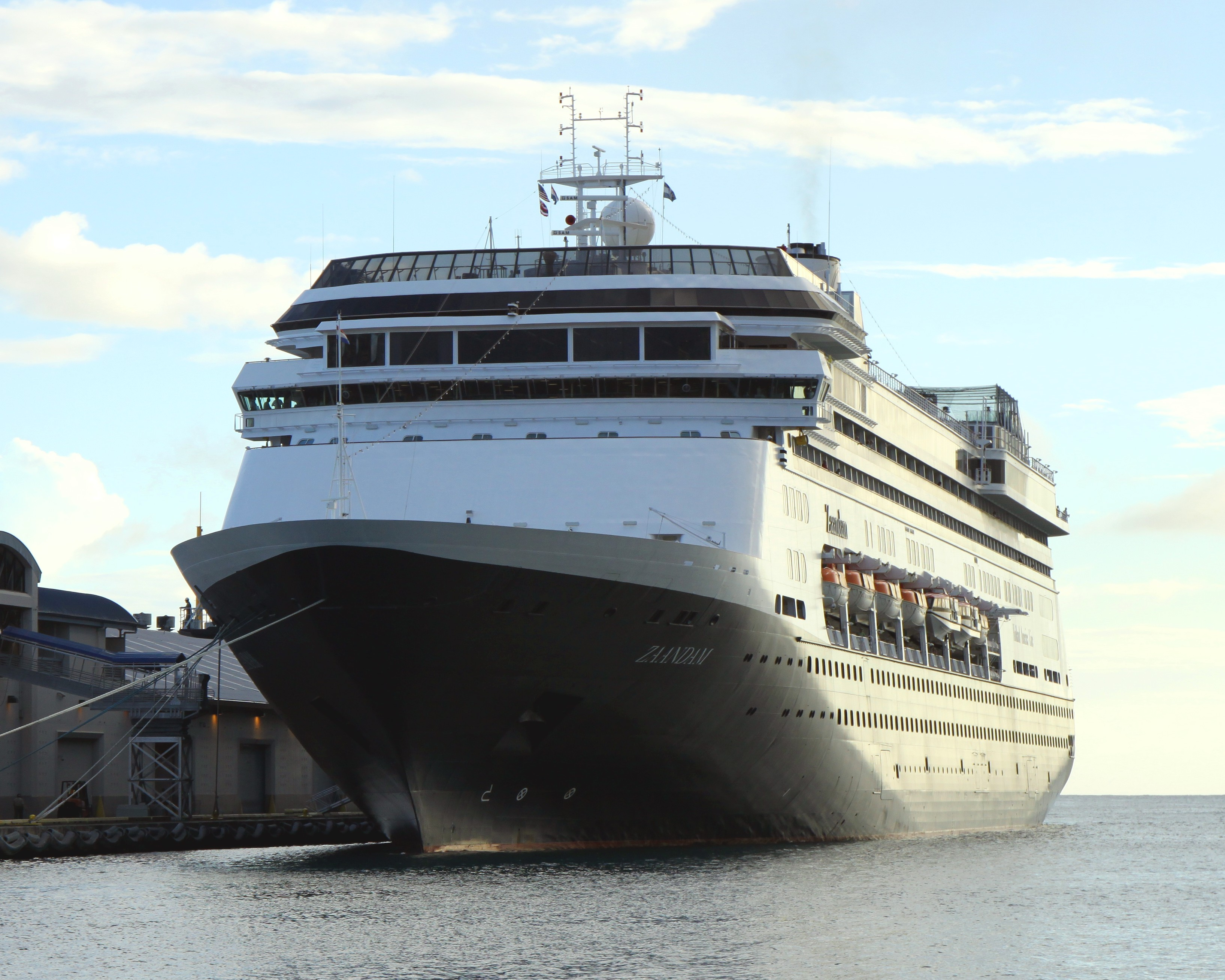 Honolulu Harbor, Hawaii'i